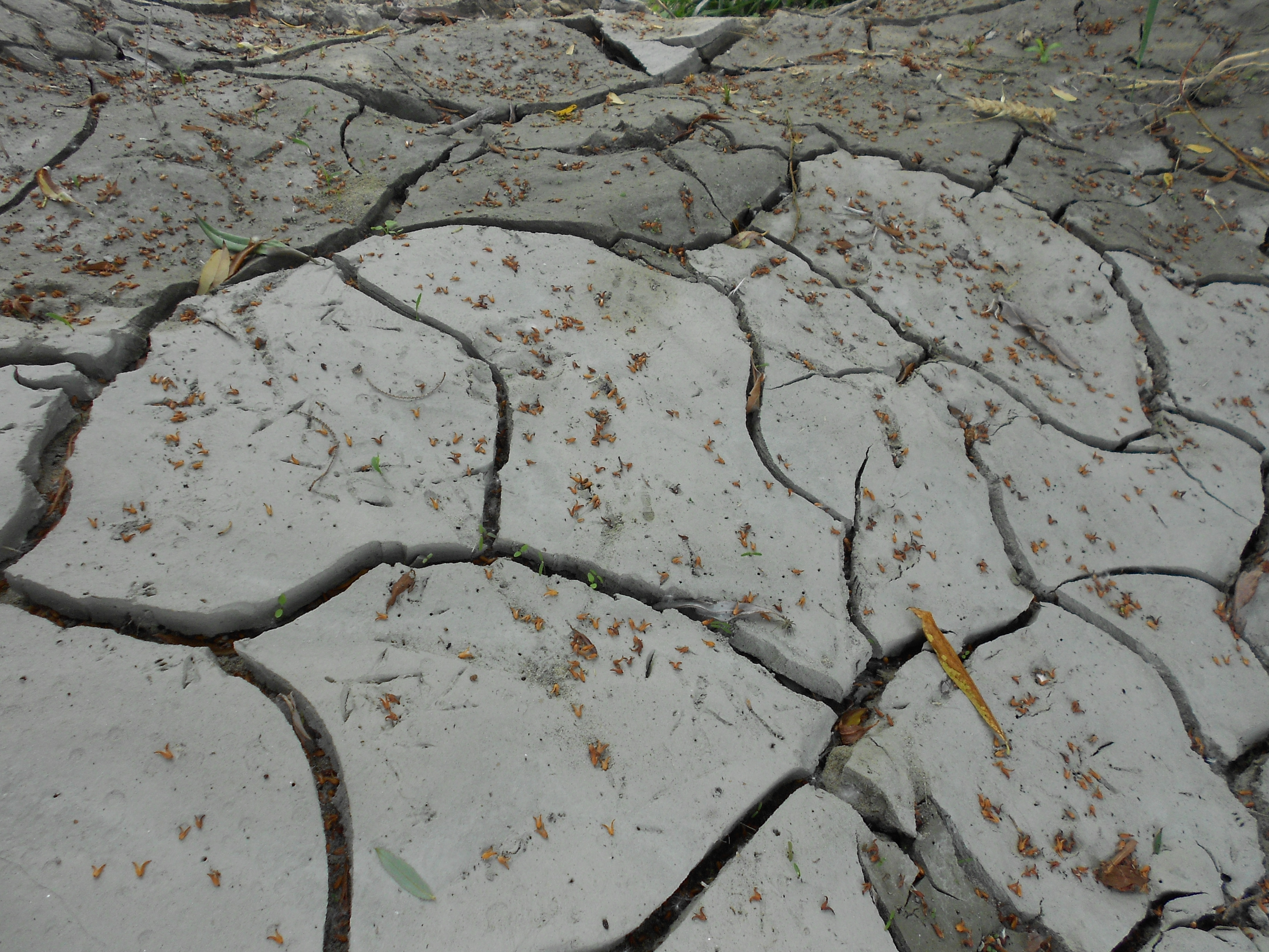 fango in via di essiccamento sulla riva di un corso d'acqua